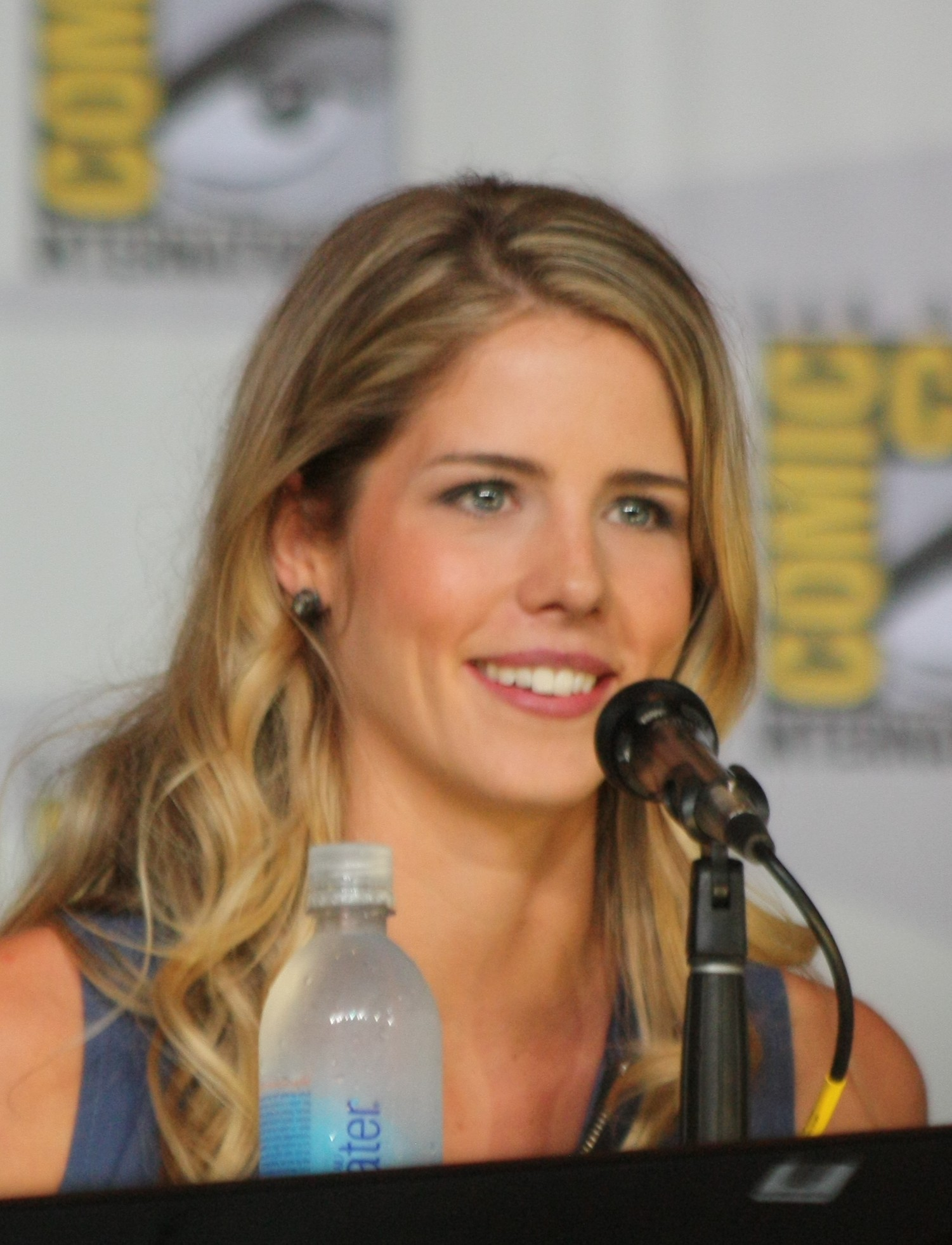 Emily Bett Rickards at the 2013 Comic-Con